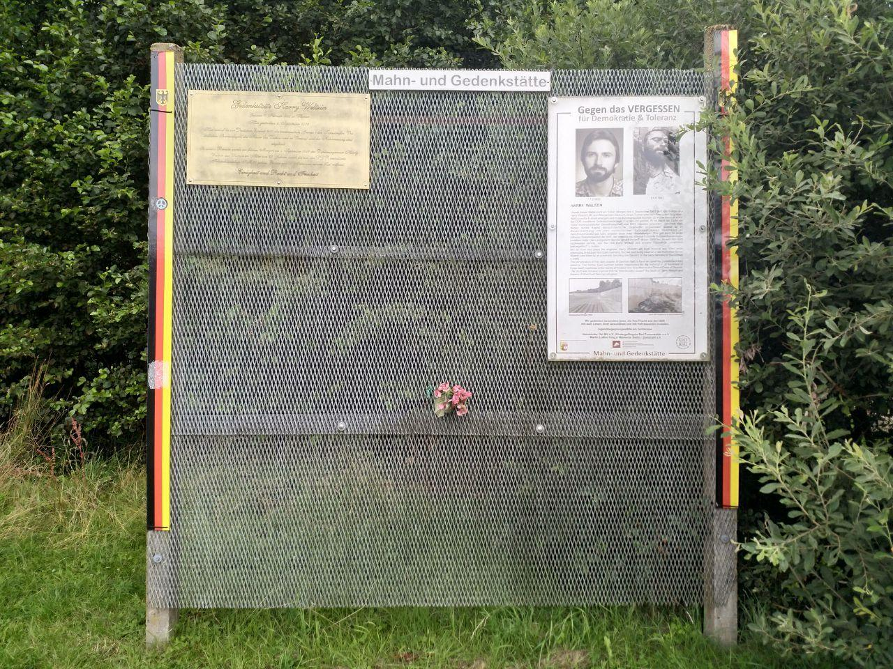 Ansicht der Gedenkstätte zum Tod von Harry Weltzin, der bei einem Fluchtversuch aus der DDR an der deutsch-deutschen Grenze starb.